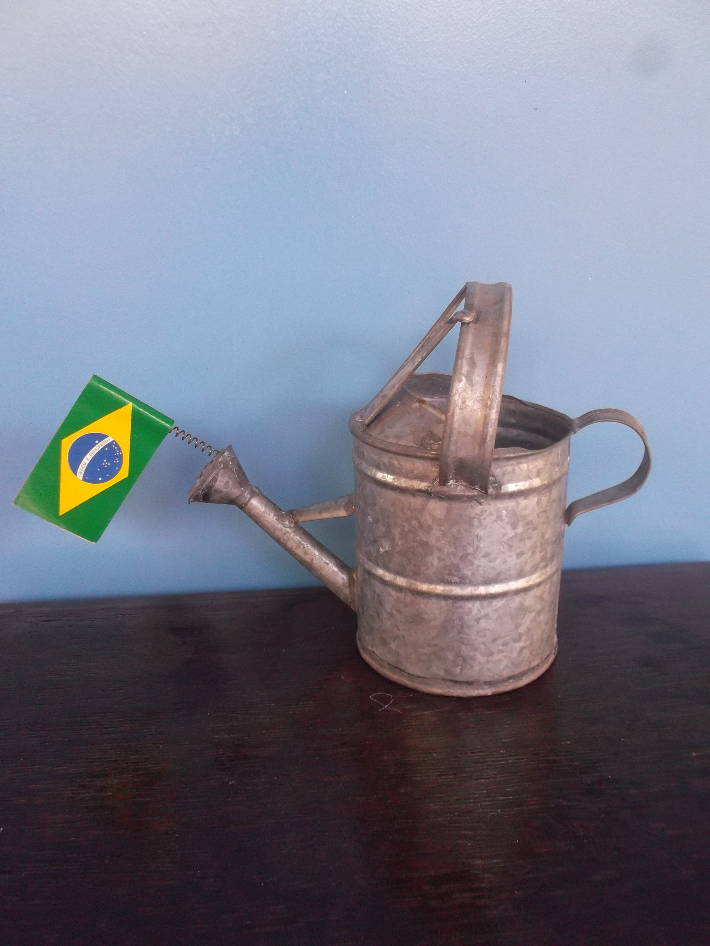 regador decorativo de artesanato de zinco com a bandeira do Brasil.